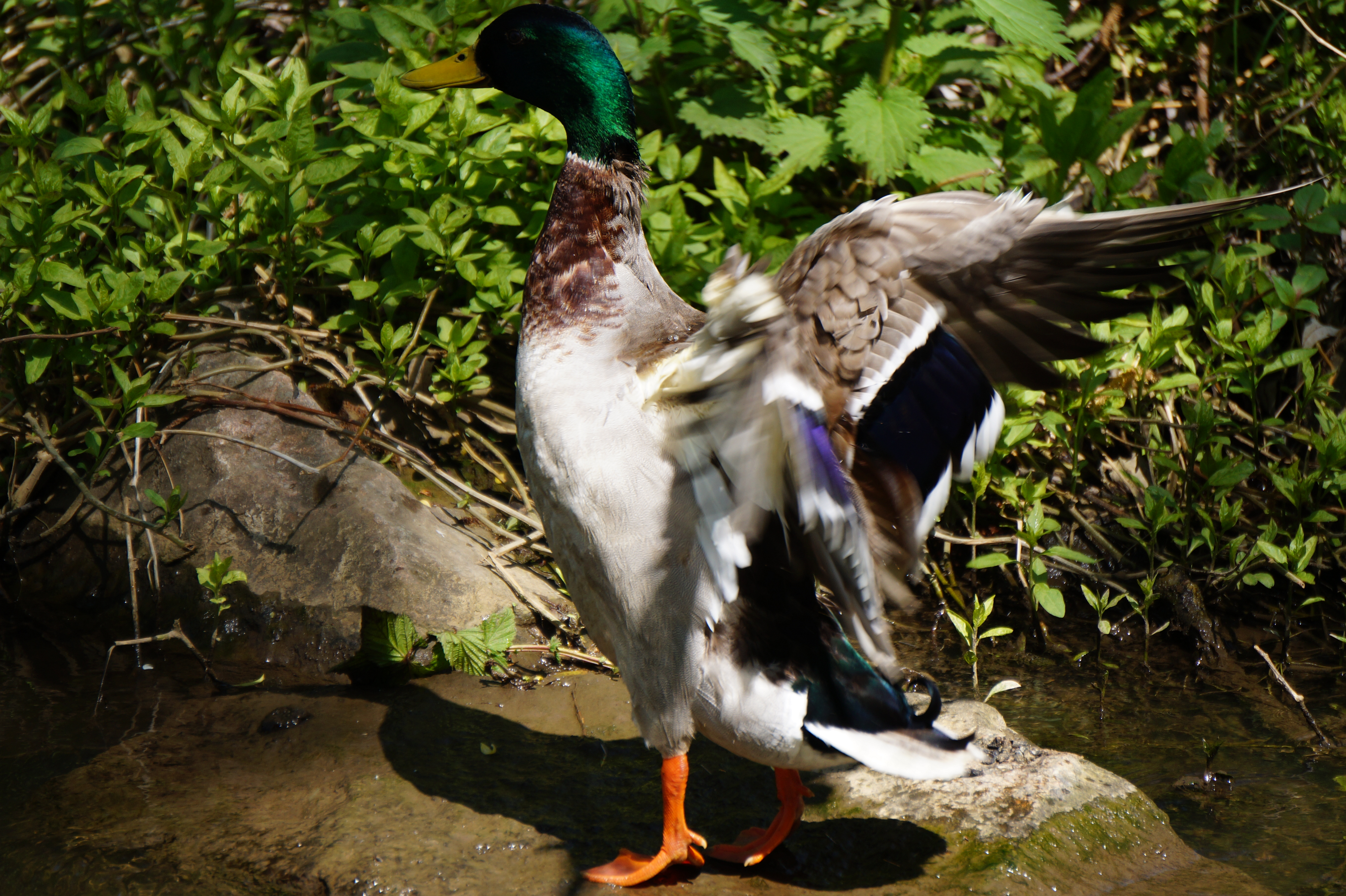 Vilstal - Amberg-Sulzbach - Landschaftsstreifen entlang der B 85 - Oberpfalz/Bayern